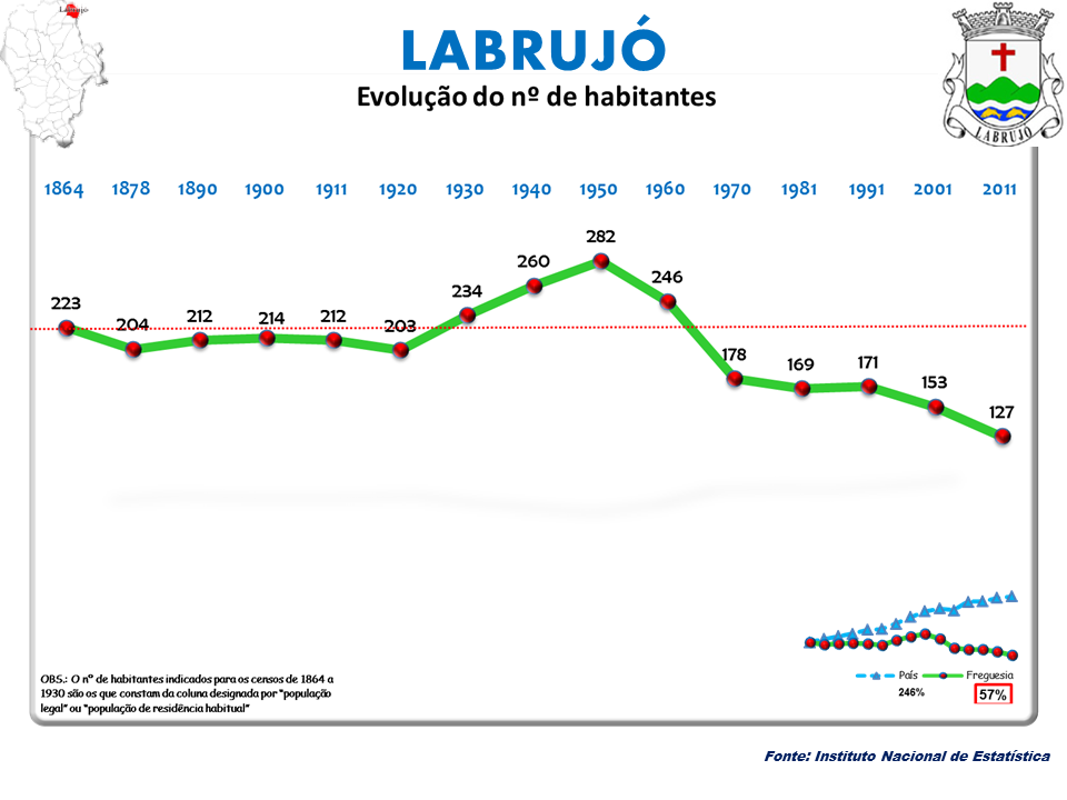 Cenos 1864/2011